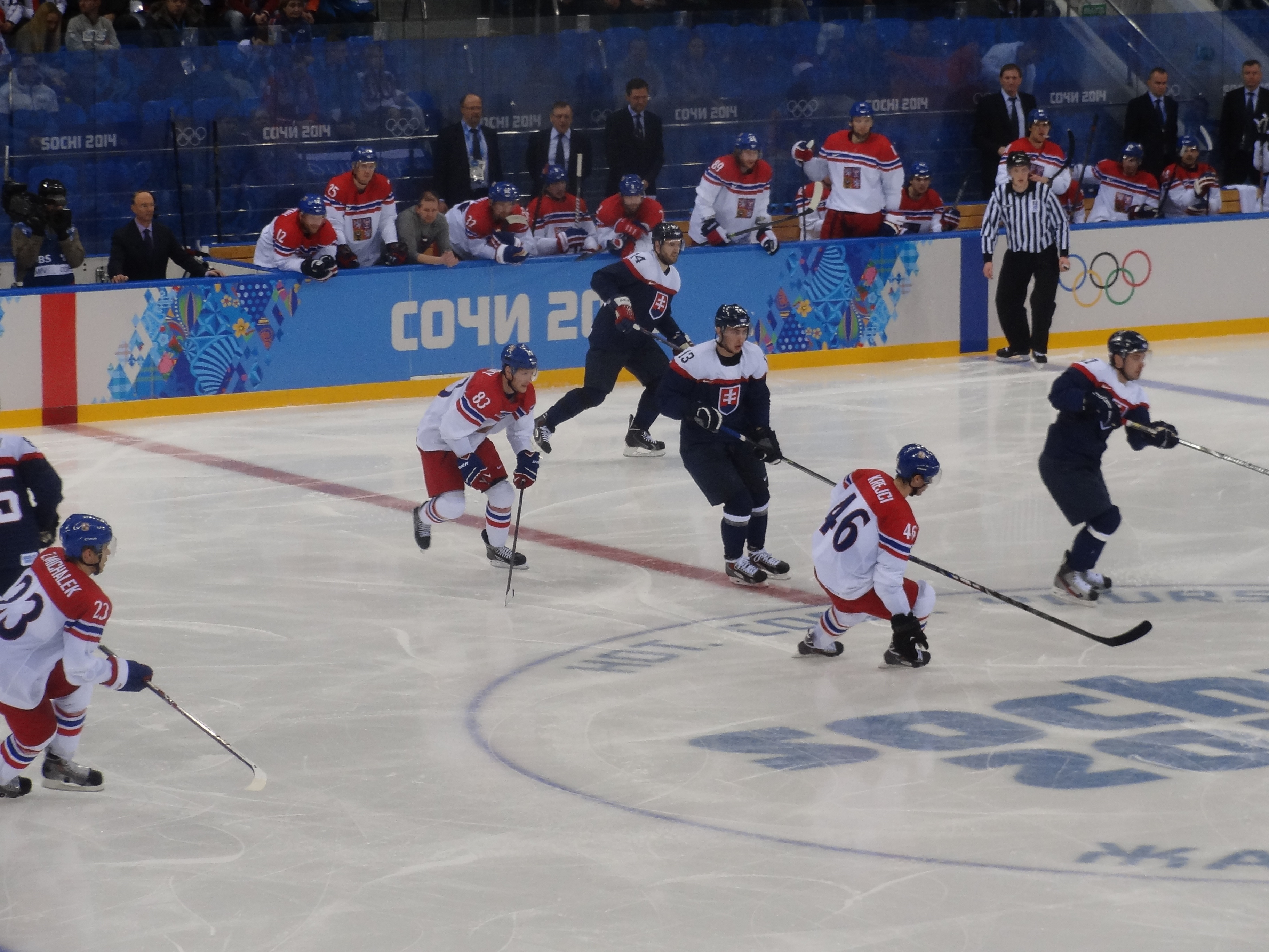 18 февраля 2014 года, Ледовая Арена "Шайба". Чехия - Словакия 5:3 (3:0, 1:1, 1:2)